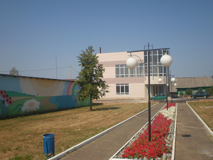 Благоустройство Шаранга